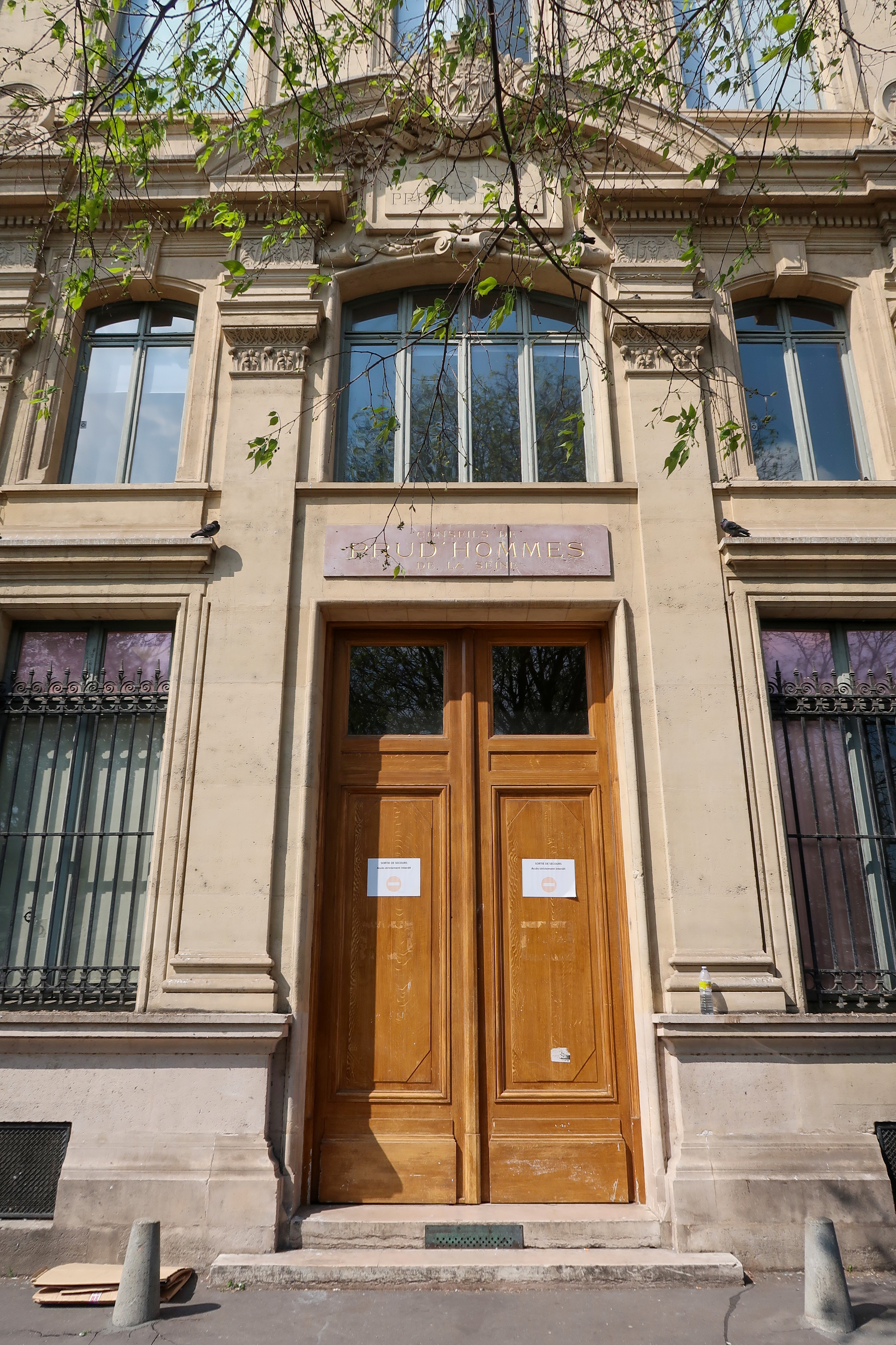 Conseil de prud'hommes de la Seine, rue Aubé (Paris, 4e).